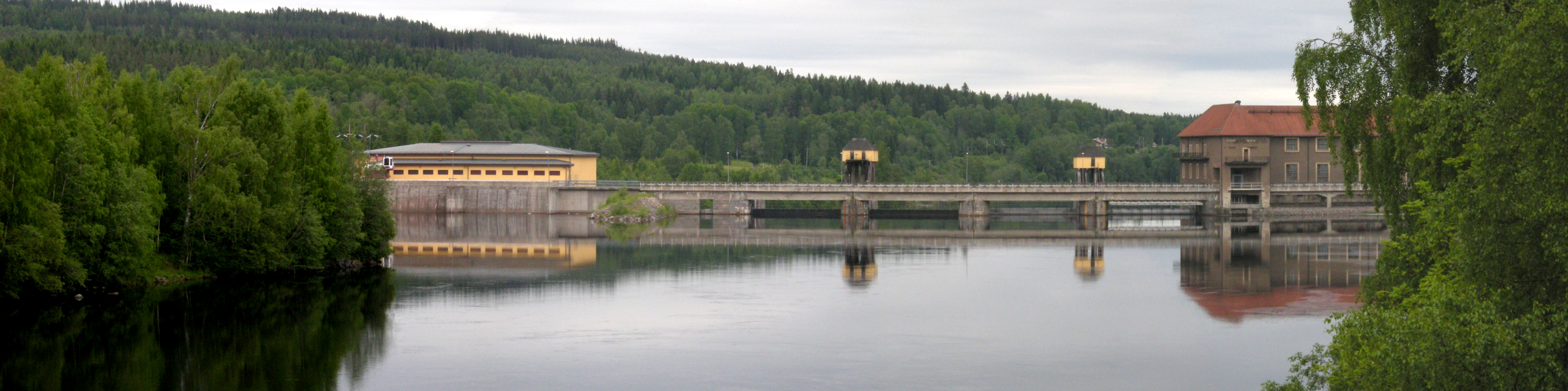 Forshuvudforsens kraftverk. Sammansatt bild.